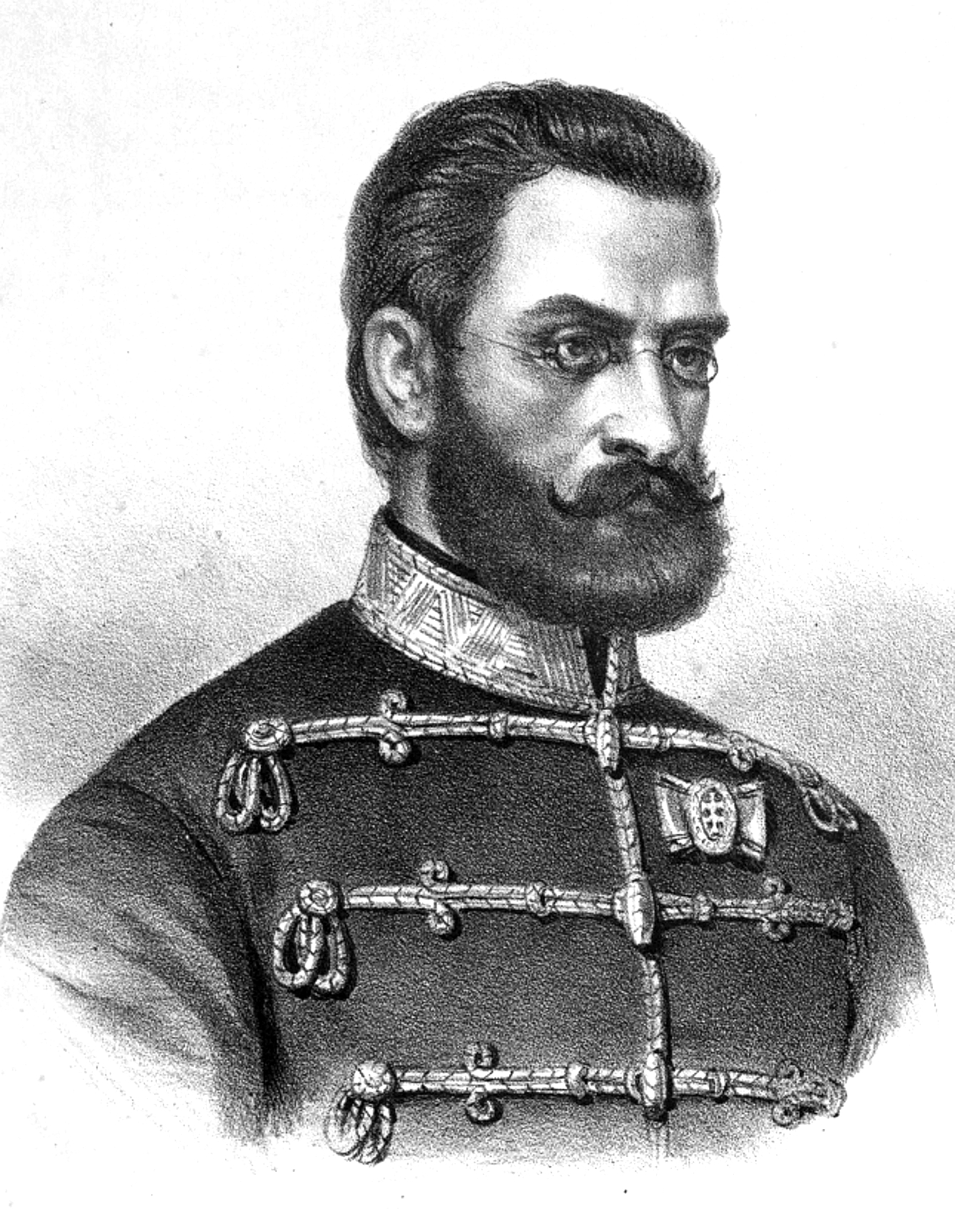 Knezich Károly (1808–1849) honvéd tábornok